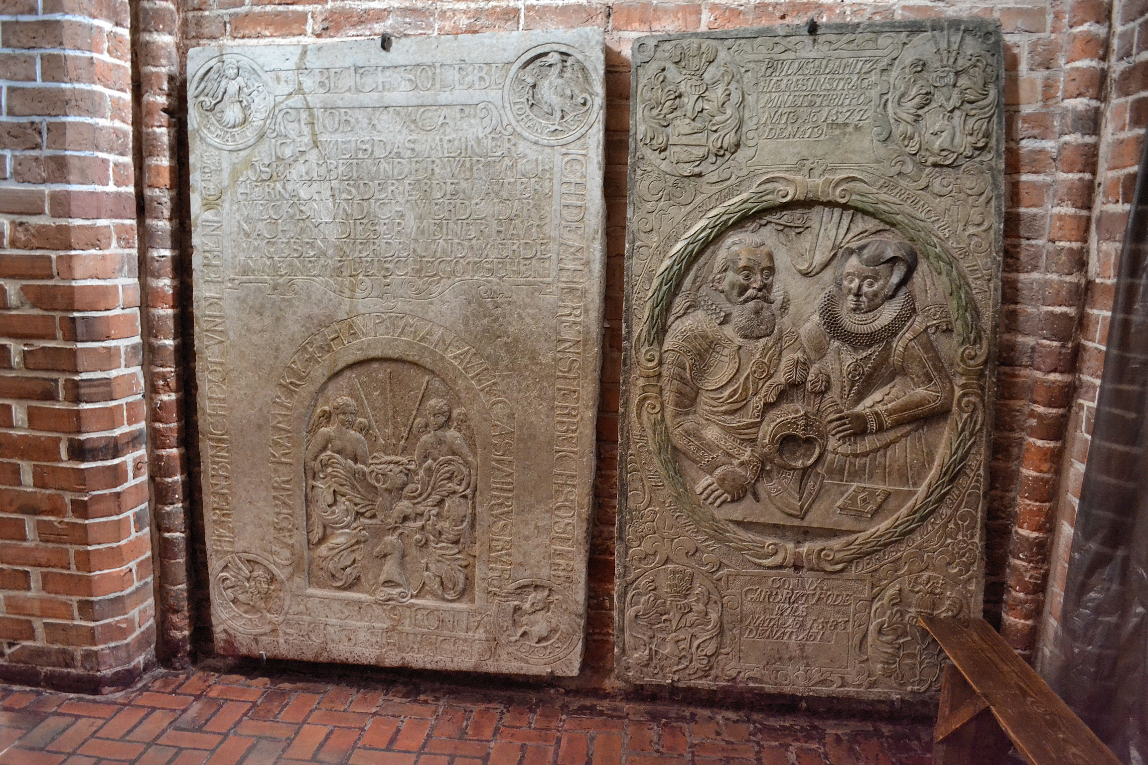 Płyty nagrobne w kołobrzeskiej katedrze